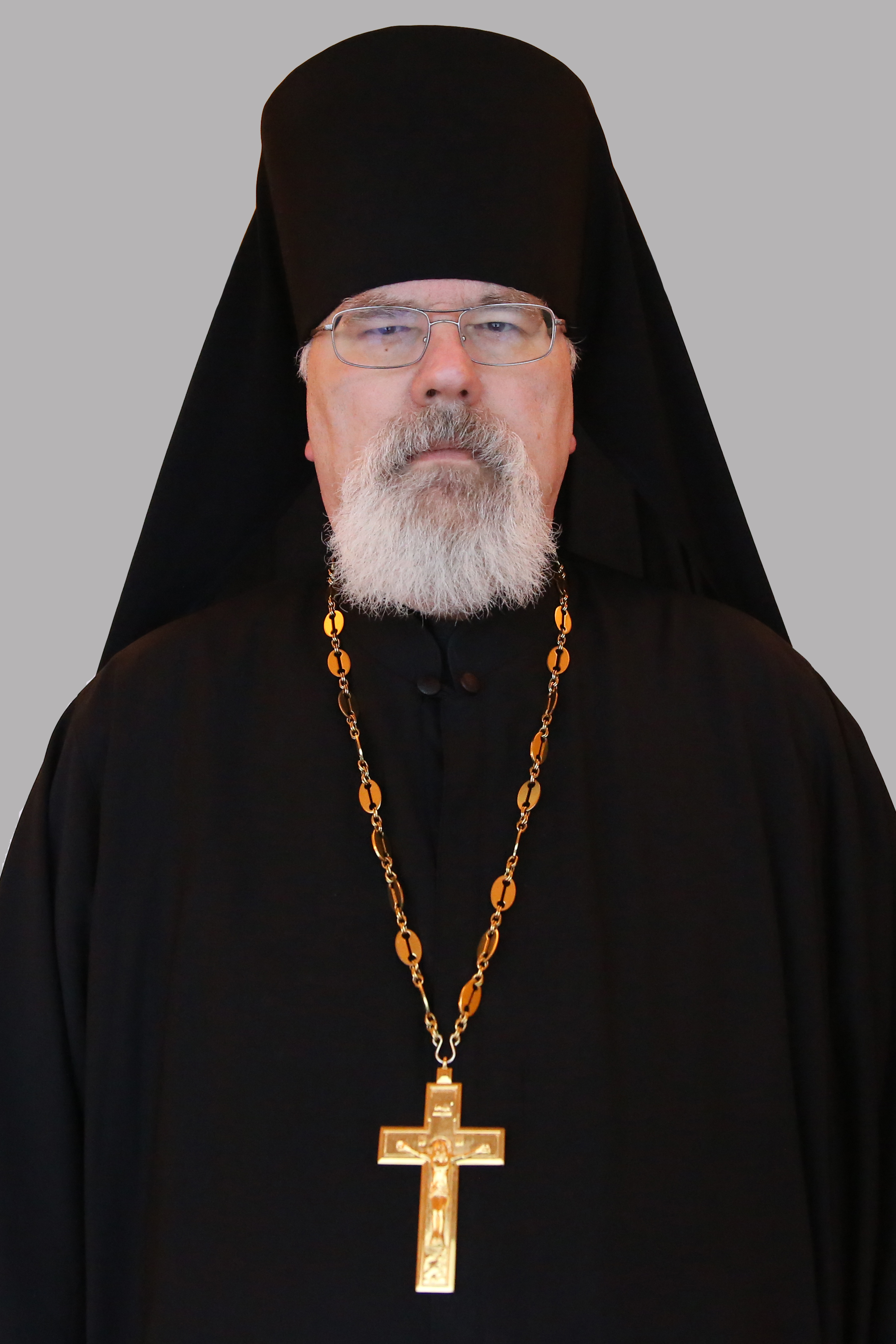 Иеромонах Константин (Симон)